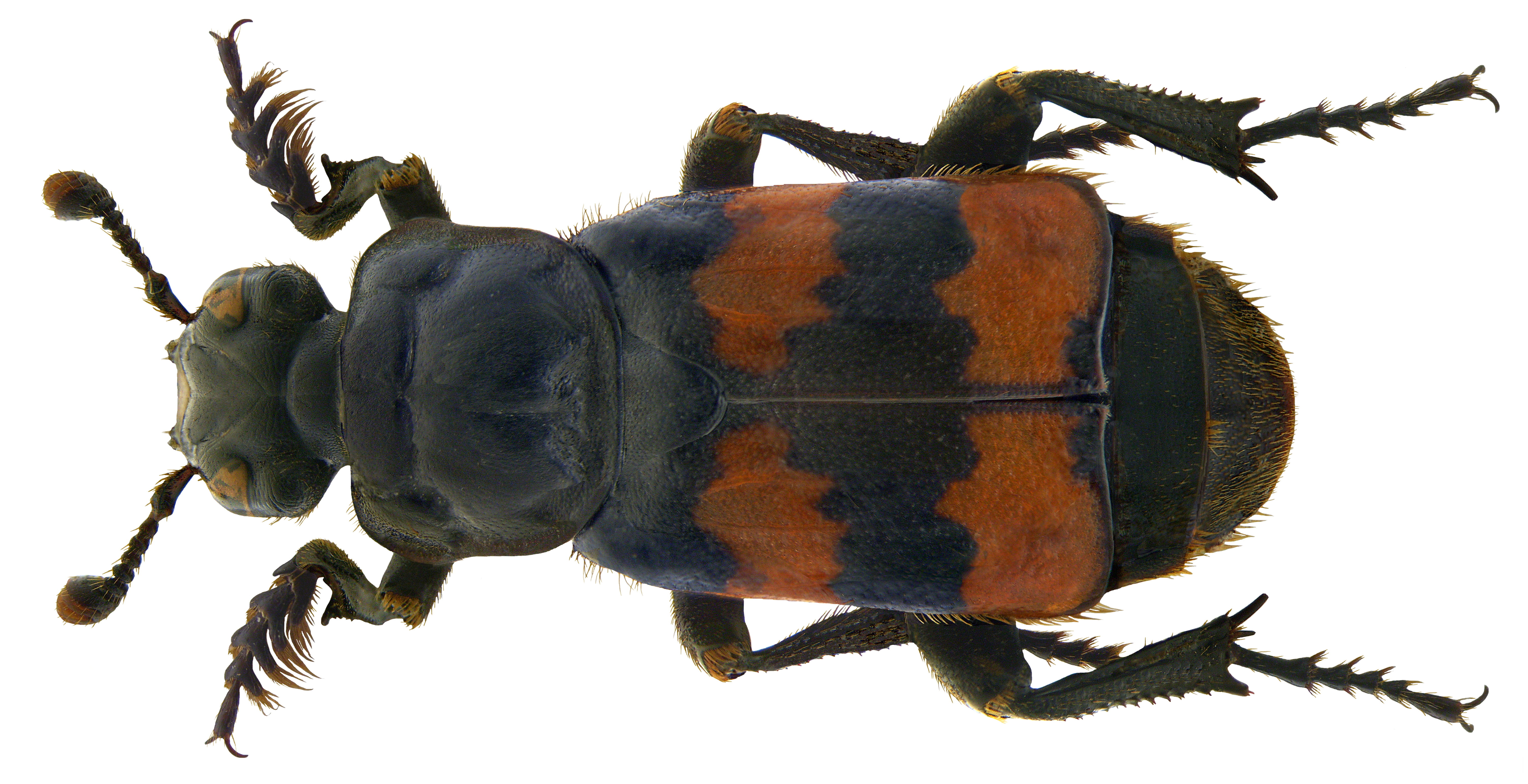 Familie: Silphidae Grösse: 12-20 mm Verbreitung: palaearktisch Ökologie: an Aas Fundort: Germania, Bayern, Oberfranken, Kulmbach leg.det. U.Schmidt, 1973 Foto: U.Schmidt, 2009